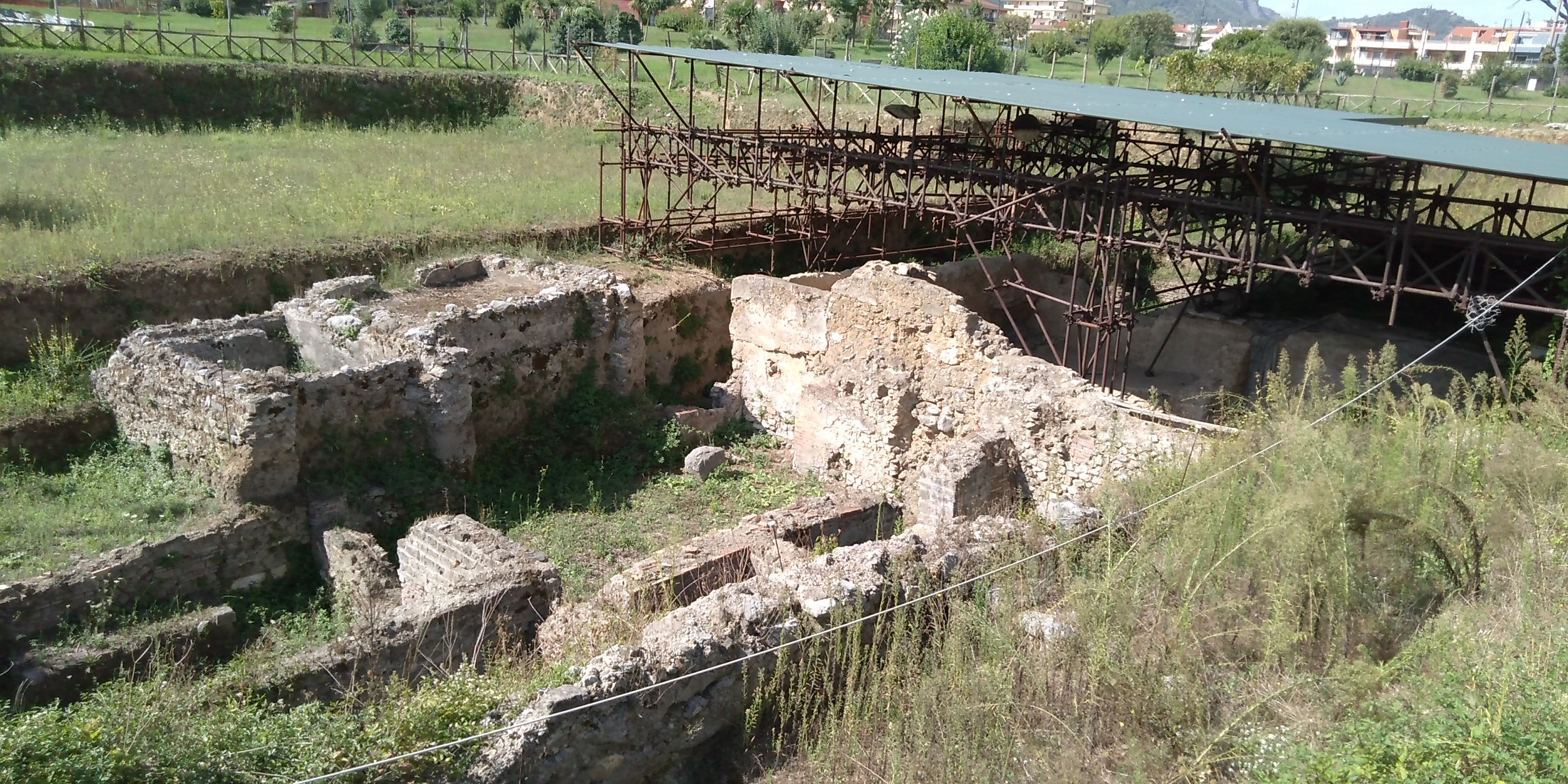 Resti del foro di Nuceria Alfaterno, presso il parco archeologico